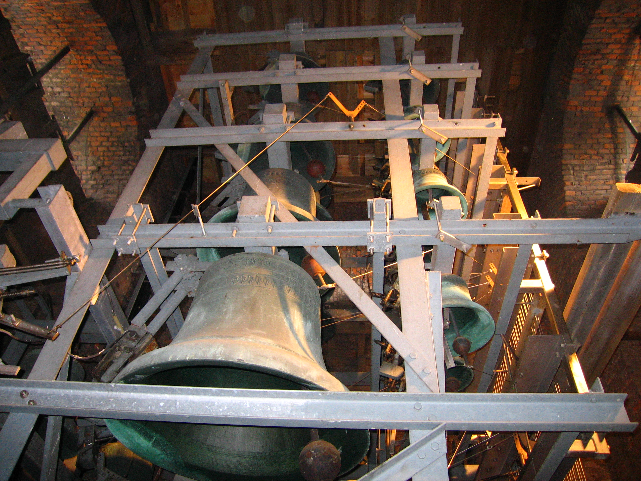 eigen foto